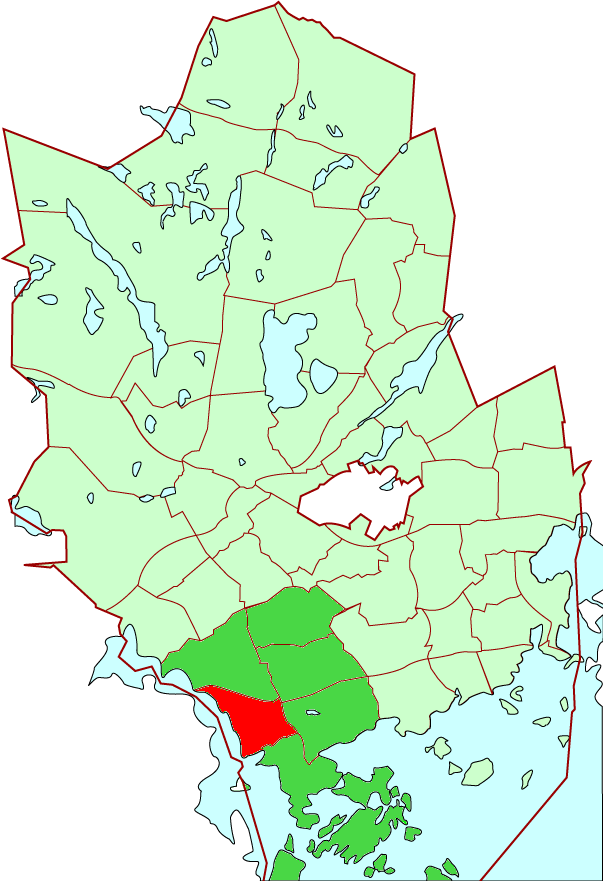 Espoonlahti/Esboviken district in Espoo city, Finland